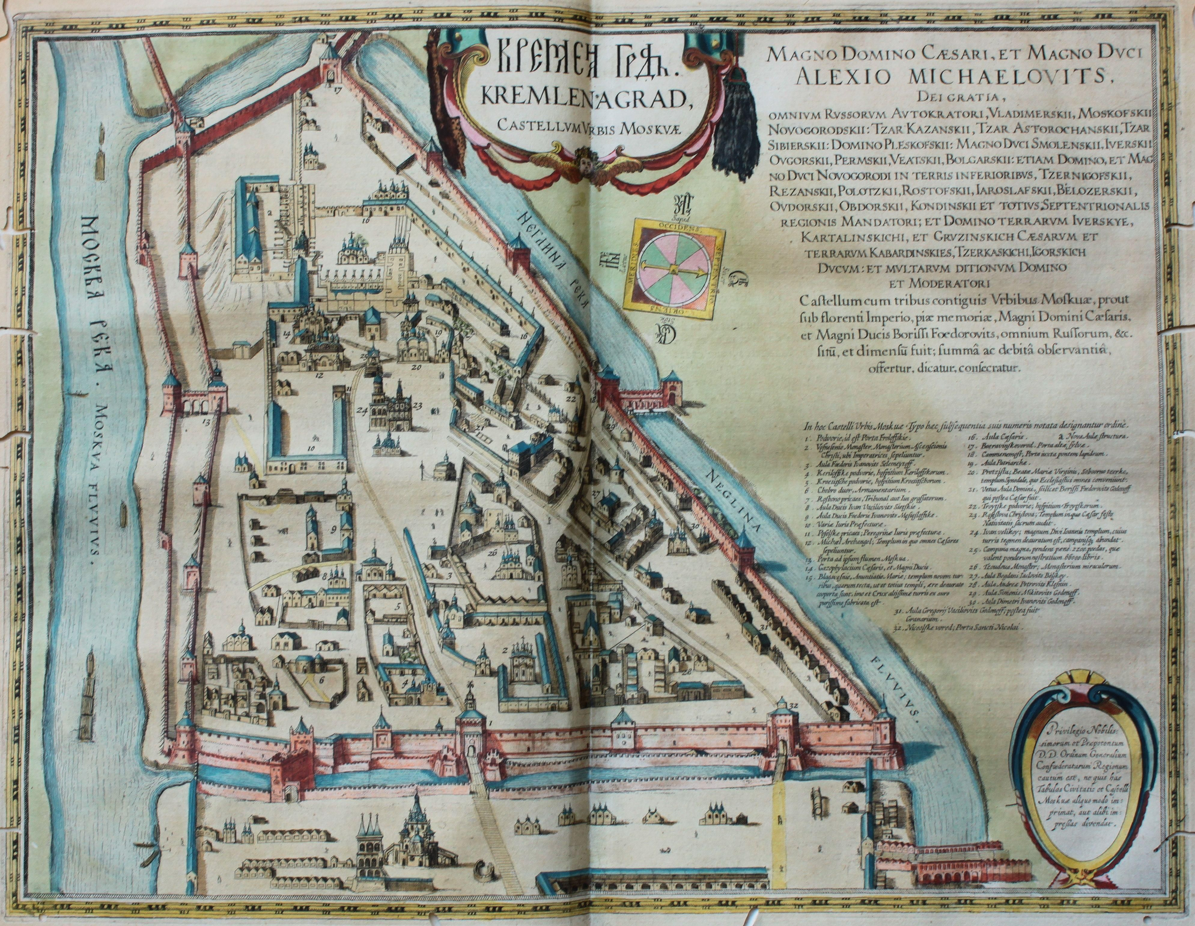 Descripción bibliográfica: Geographia Blaviana. - [Amsterdam : Juan Blaeu, 1659] . - [32], VI, 96 p., 34 f., h. 35a, 35b, 35c, 35d, 36-44 f., 34, [2], 36-40, [2], 43-70 [i. e. 75], [1] f., [20] p. de map., [9] f. de map., [4] f. pleg. de map., [2] f. de plan., [2] f. ge grab. : |bil. ; |cFol. marca major (57 cm.) . - En la dedicatoria a Felipe IV: "Presenta ... El Atlas Universal y Cosmographico de los orbes y terrestre ... Juan Blaeu" . - Título tomado del frontispicio. -- Privilegio fechado en 1659. -Errores de pag. - Sign.: 1, *2, **3, ***-****2, a-e2, A-I2, K1, L-Z2, Aa-Dd2, 4 2, Ee-Ff2, A-I2, K1, L2, M1, N-Y2, Z5, Aa-Dd2, Ee1, A-D2, E-F1, G-I2, K-L1, M-O2, P1, Q-Z2, Aa-Bb2, Cc1, Dd3, Ff-Zz2, Aaa-Bbb2, . - Frontispicio grab. col. -- Incluye un total de 49 il. entre map., plan. i grab. Materia: Atlas - Obras anteriores a 1800 Impresor: Blaeu, Joan, 1596-1673, imp. Lugar de impresión: Holanda. Amsterdam Localización: Vea la ilustración en su contexto Visite también la exposición "Cartografía histórica en la Biblioteca de la Universidad de Sevilla"